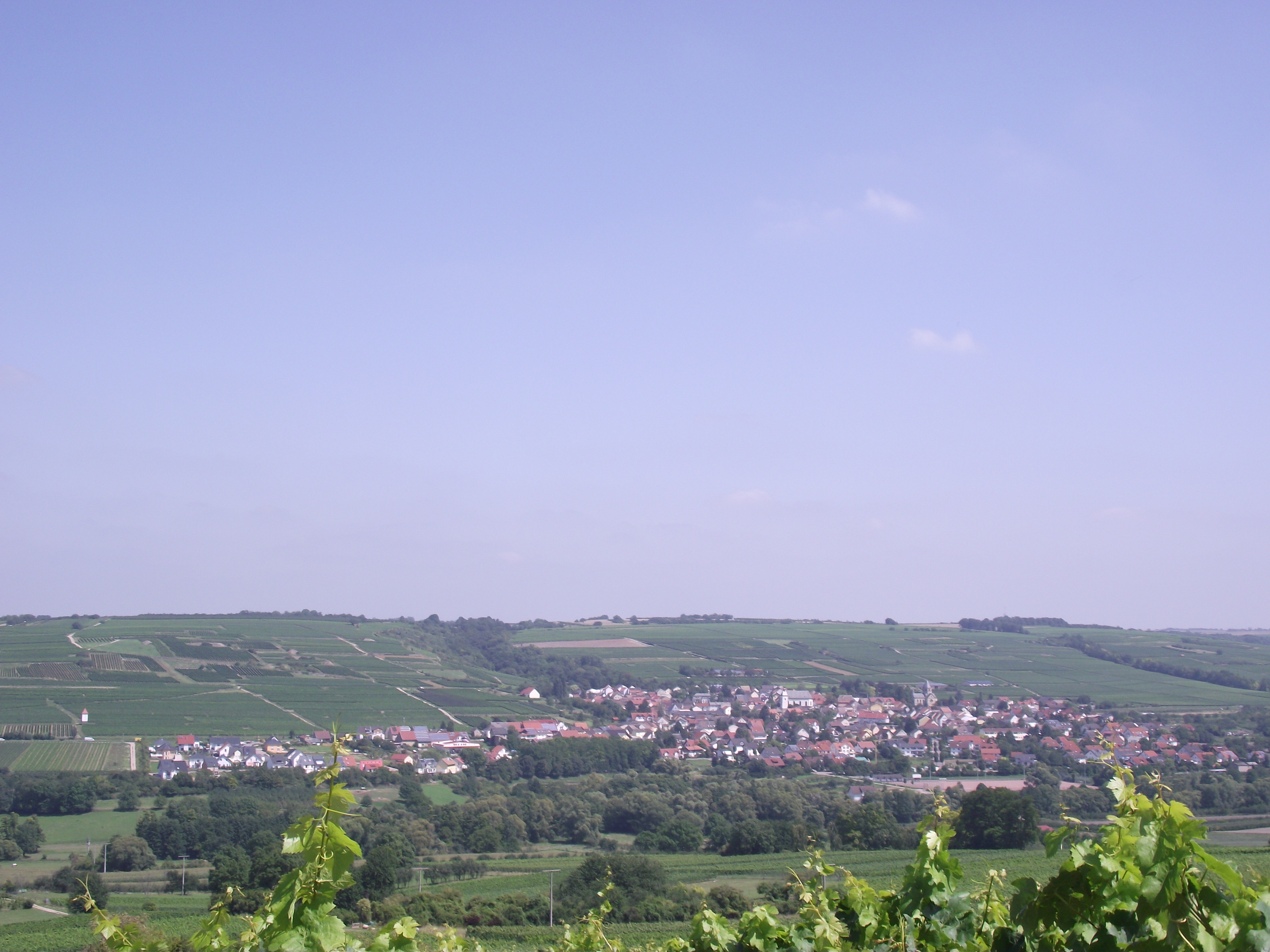 Groß-Winternheim vom Westerberg August 2011